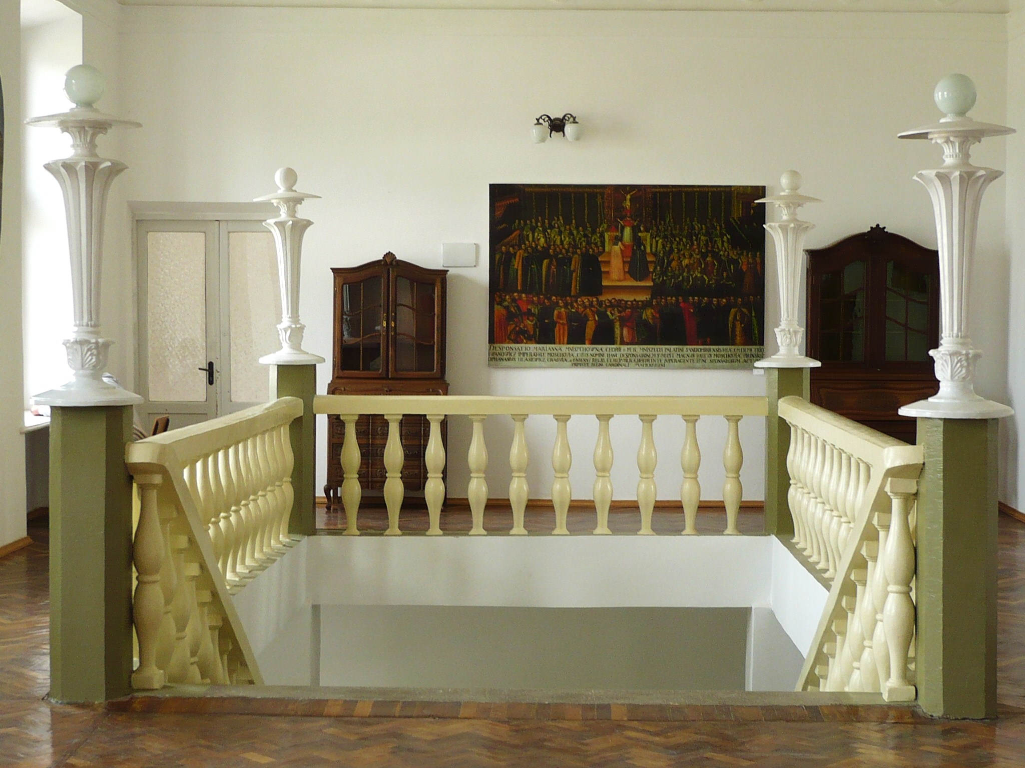 Wiśniowiec, pałac